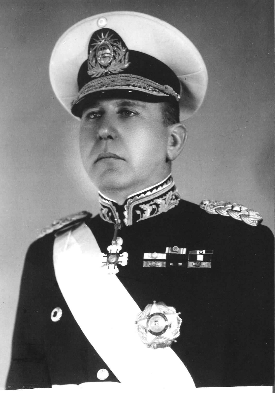 Foto como Ministro de Guerra